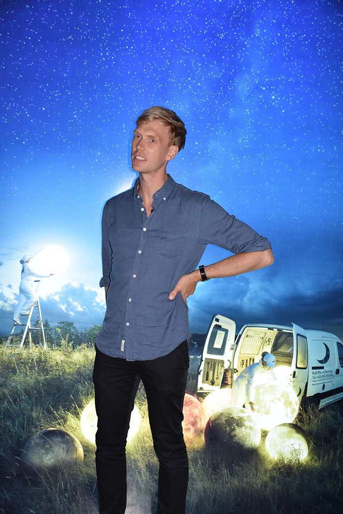 Erik Johansson 사진전을 위해 한국을 찾은 에릭 요한슨 (2019.6.4)